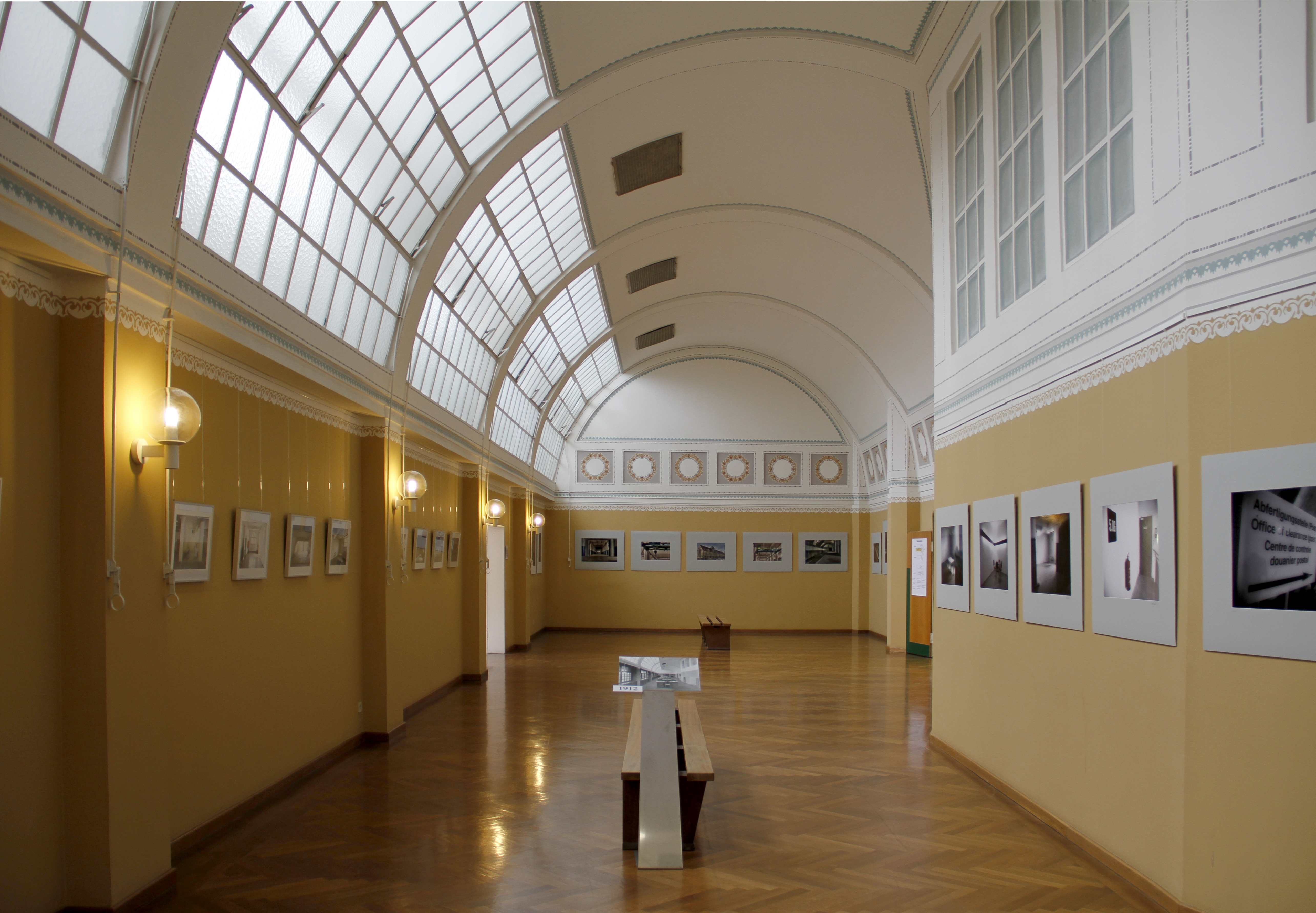 Hauptzollamt München, Revisionsbüro im ersten Obergeschoss. Restauriert bis 1987 nach Farbresten und Fotos aus der Bauzeit 1912